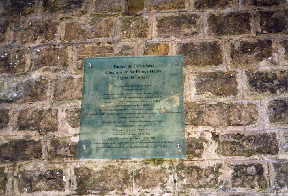 Technische daten des längsten Tunnels der Attertlinie